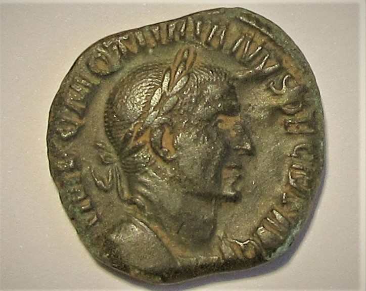 Avers des Sesterzes von Traianus Decius